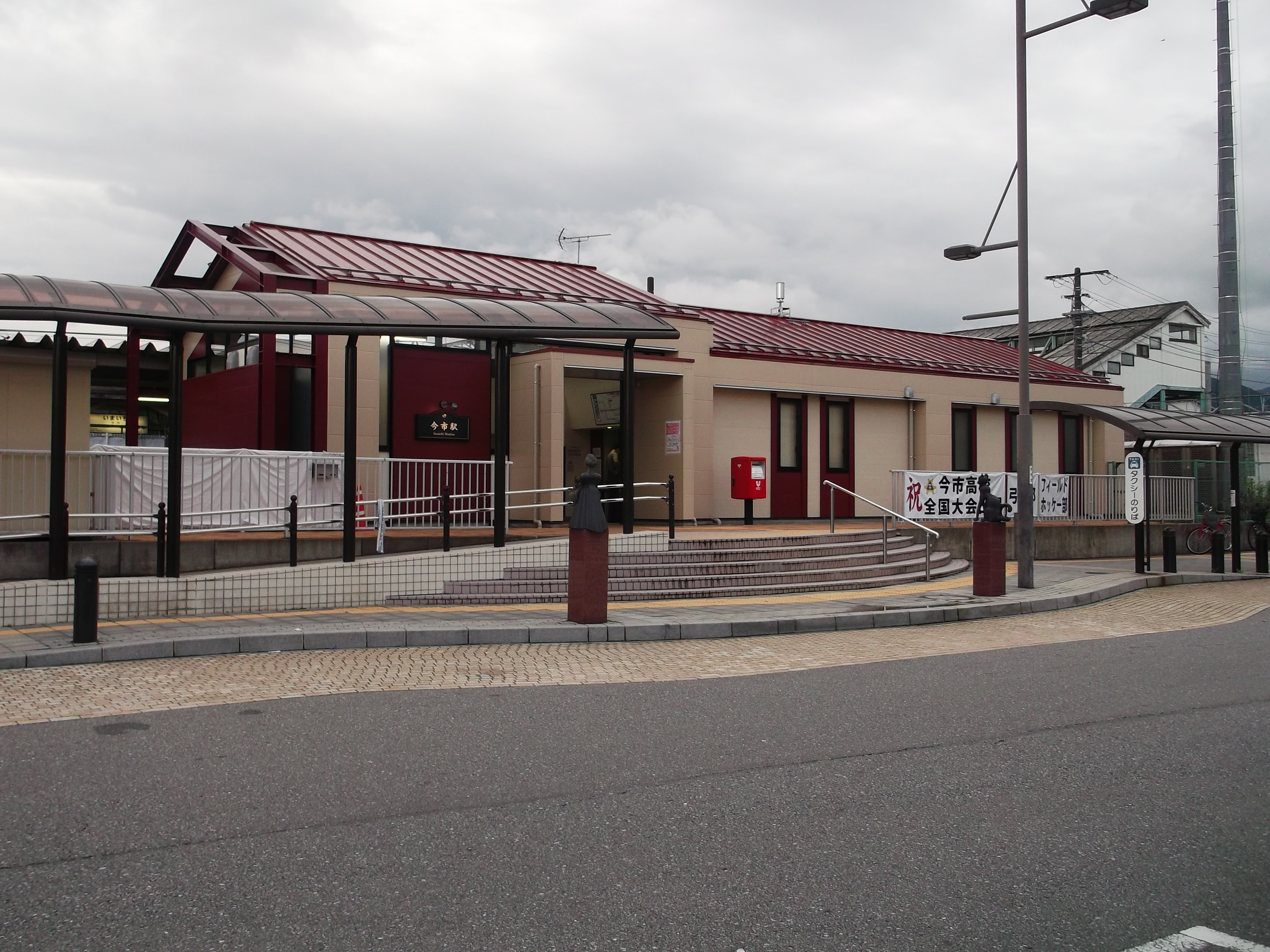 JR日光線 今市駅仮駅舎 2014年7月20日撮影